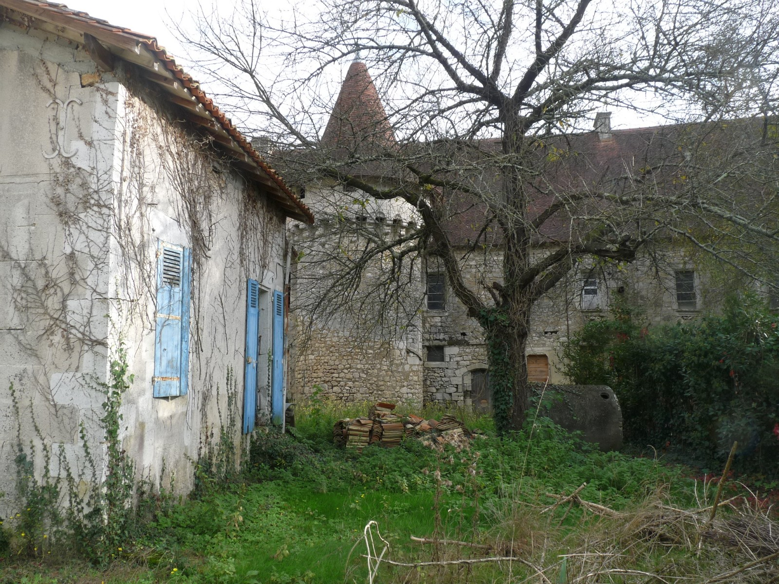 Château de Pranzac, Charente, France